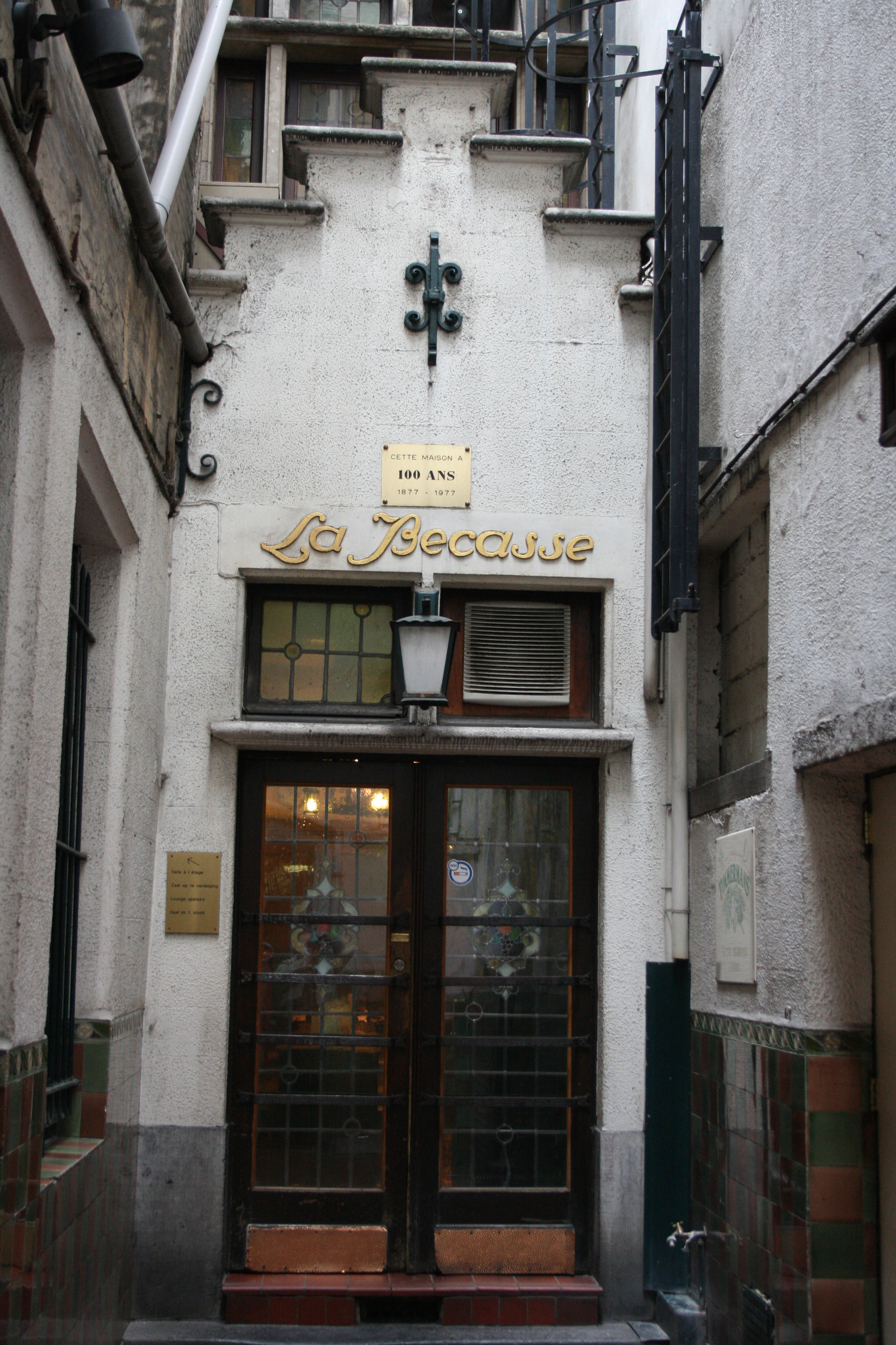 Rue de Tabora 11, Bruxelles (Belgique). Café "La Bécasse"